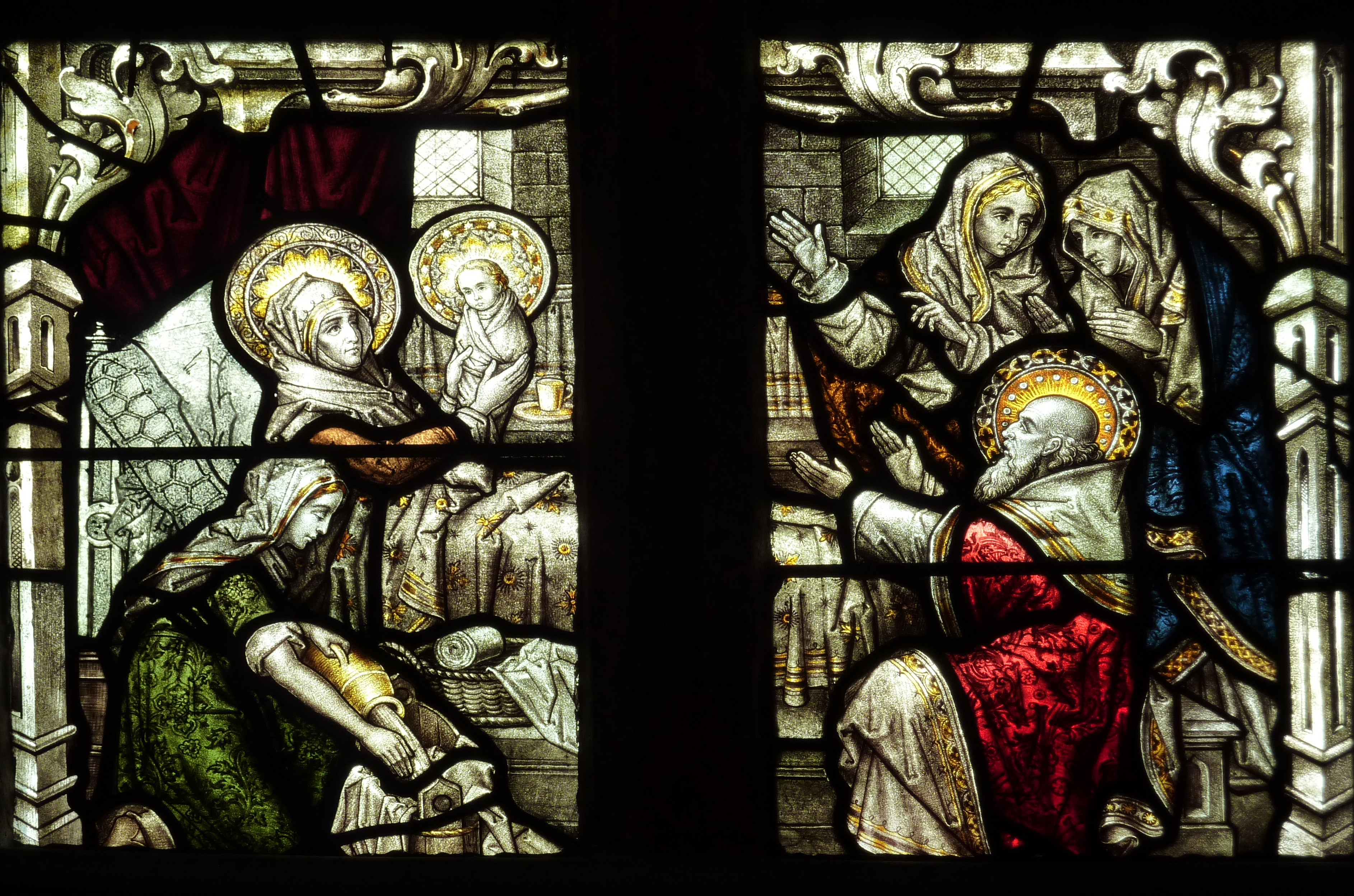 Ausschnitt eines Bleiglasfensters in der katholischen Pfarrkirche Hl. Dreifaltigkeit in Monreal, Darstellung: Geburt Marias